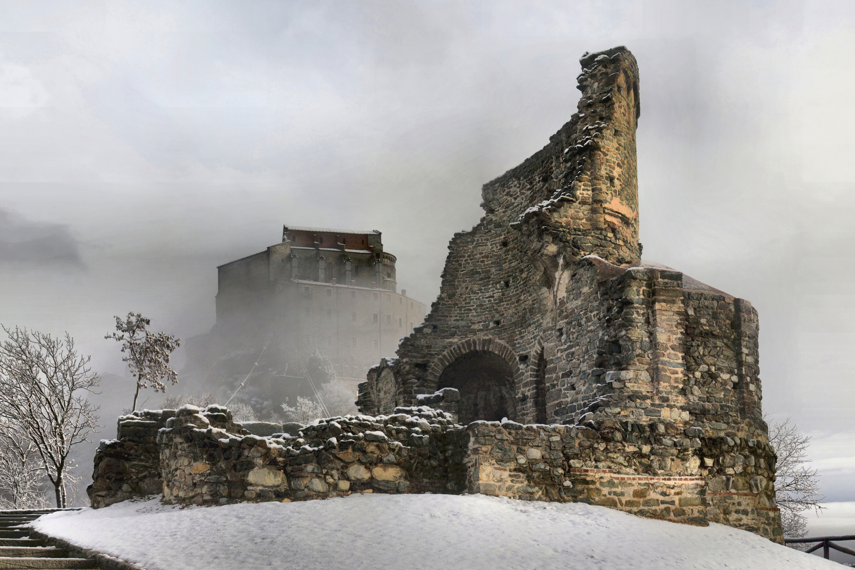 Sacra di San Michele This is a photo of a monument which is part of cultural heritage of Italy.